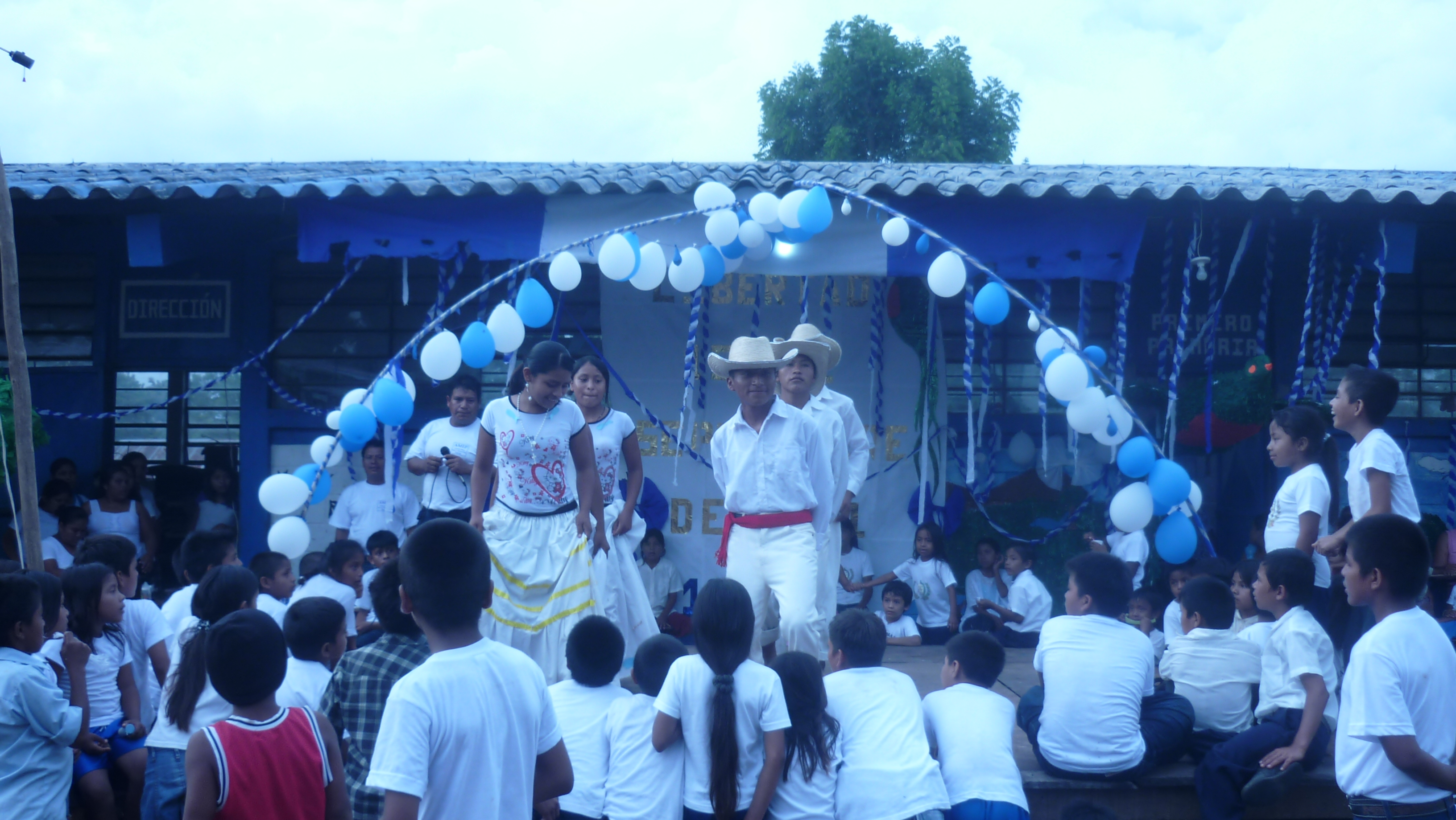 Alumnos del instituto básico en una presentación folclórica. Entre Ríos, municipio de Sayaxché, Guatemala.